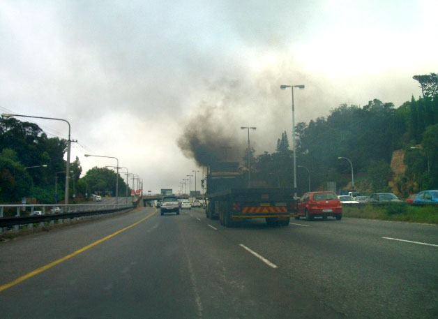 Luftverschmutzung durch Fahrzeuge, hier eines LKW auf einer südafrikanischen Autobahn verursacht durch grobe Wartungsmängel